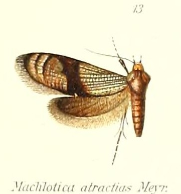 Neomachlotica atractias